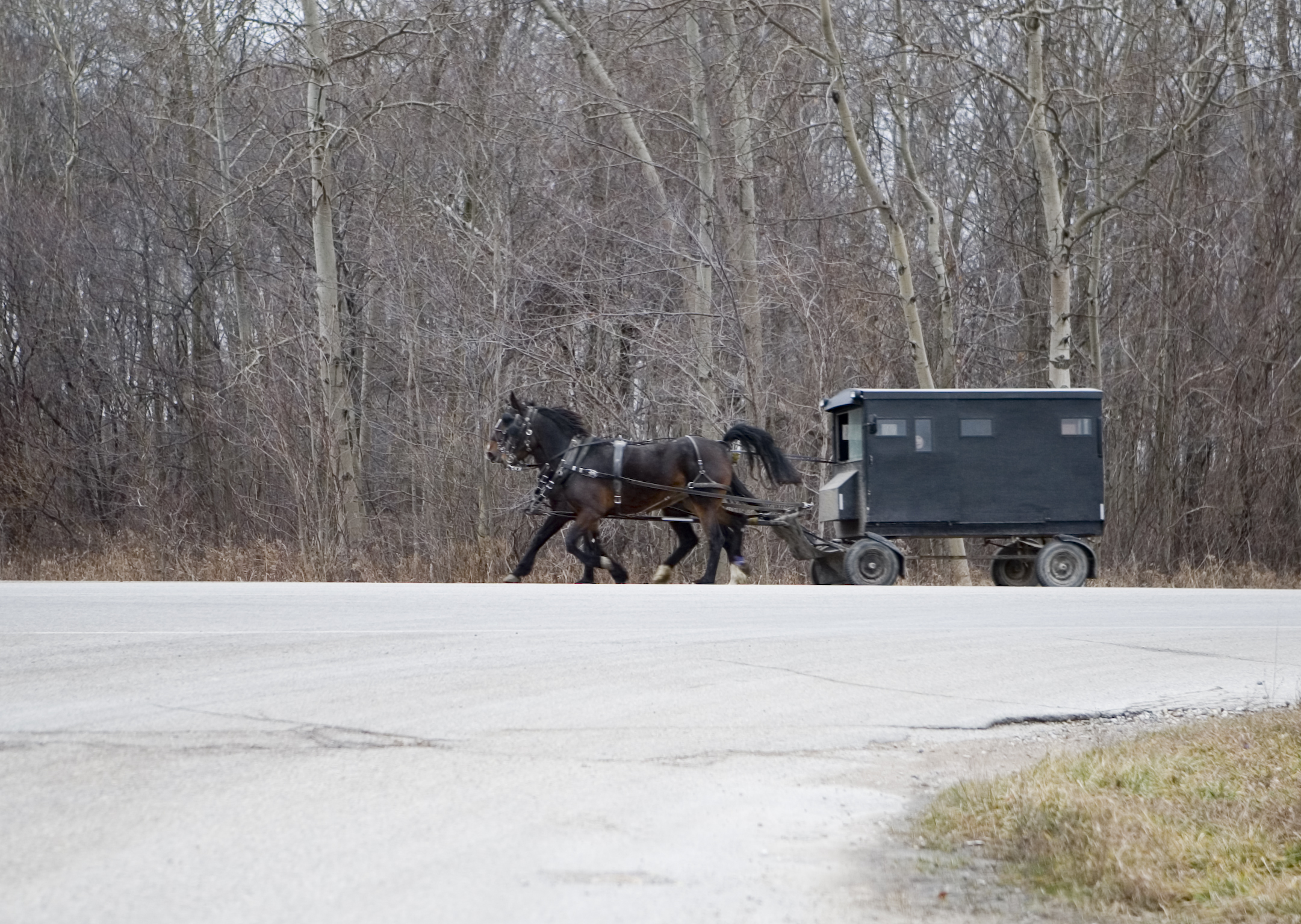 A Mennonite carriage in St. Jacobs, Ontario, Canada.